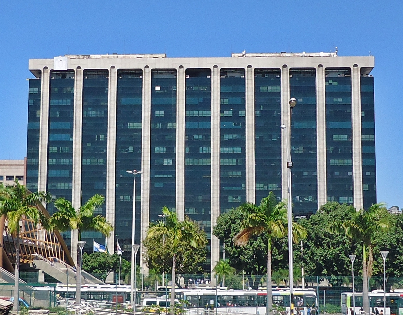 Centro Administrativo São Sebastião (CASS), cidade e município do Rio de Janeiro, estado do Rio de Janeiro, Brasil: vista a partir da estação Cidade Nova do Metrô.